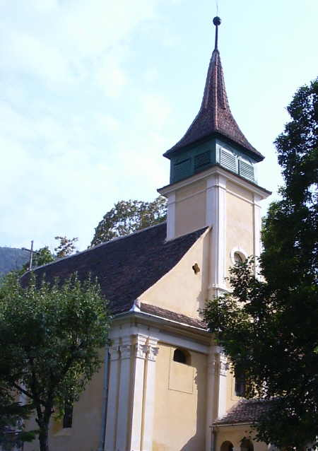 Hungarian lutheran church in Blumăna/Bolonya/Blumenau